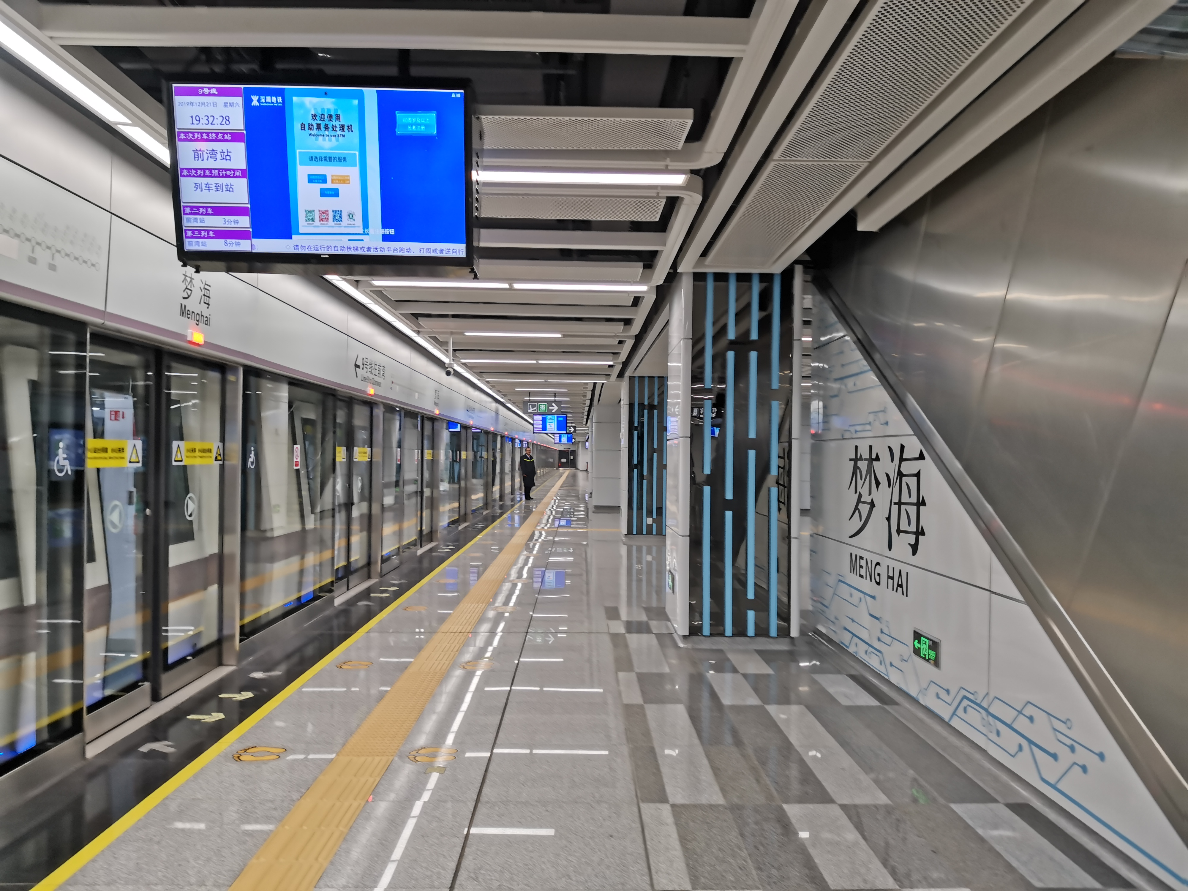 梦海站月台，往前灣方向